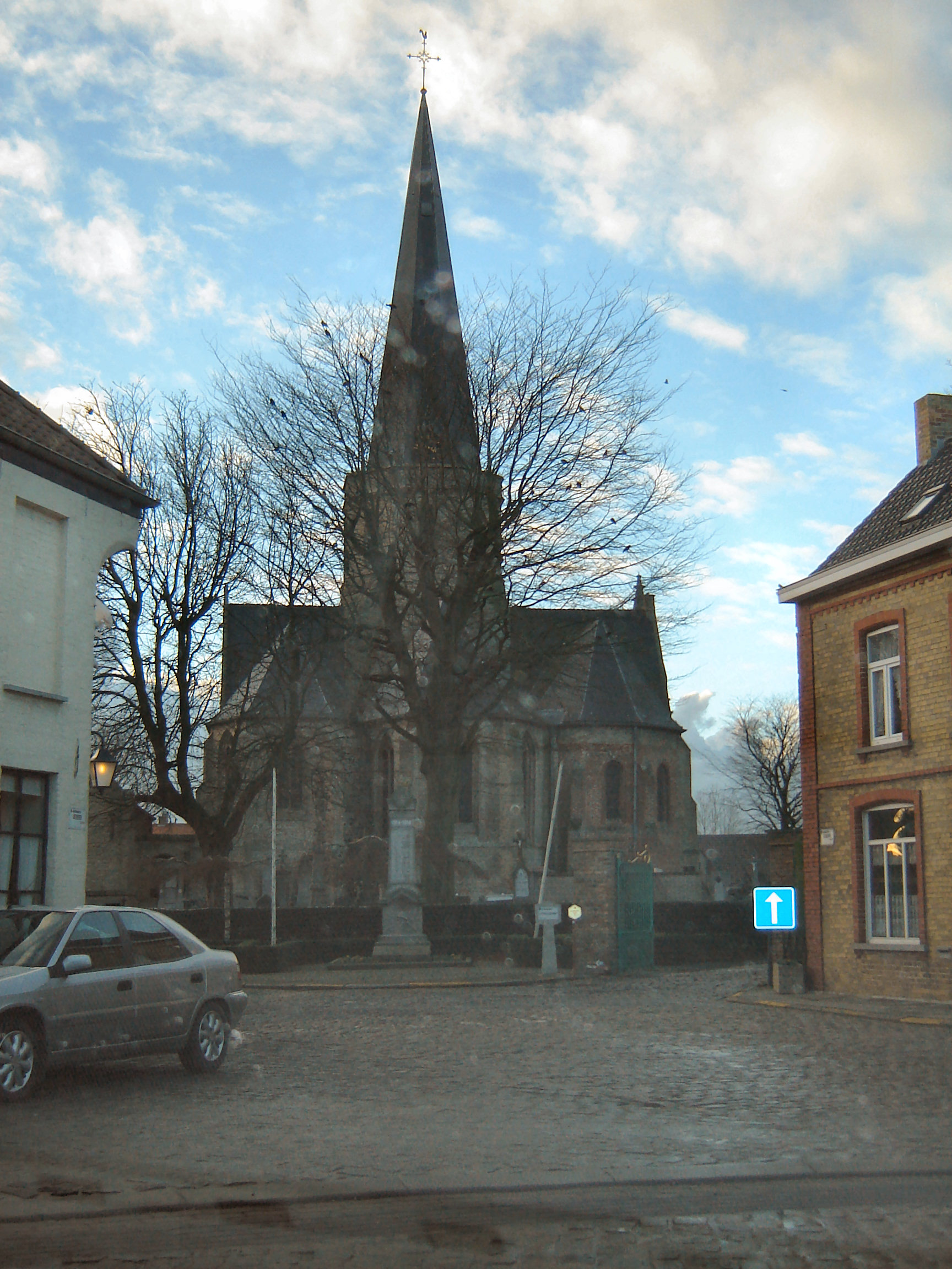 Sint-Martinuskerk in Leisele, Alveringem. Saint Martin Church in Leisele, Alveringem, West-Flanders, Belgium. As seen from main road Beverenstraat/Izenbergestraat.